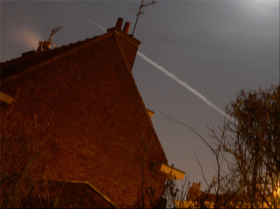 vue d'une trainée d'avion(contrail) pose de 15 secondes, par nuit froide, non nuageuse,de pleine lune, claire, non brumeuse et sans vent. La lune sur la photo serait positionnée au dessus de la trainée en haut à droite. on en voit le halo photo prise en banlieue liloise dans le nord de la France 14 janvier 2006, par F Lamiot .